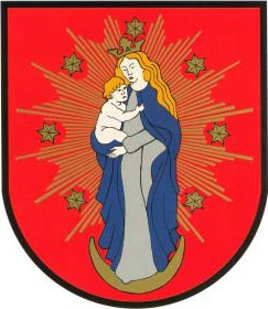 Wappen der Gemeinde Preding